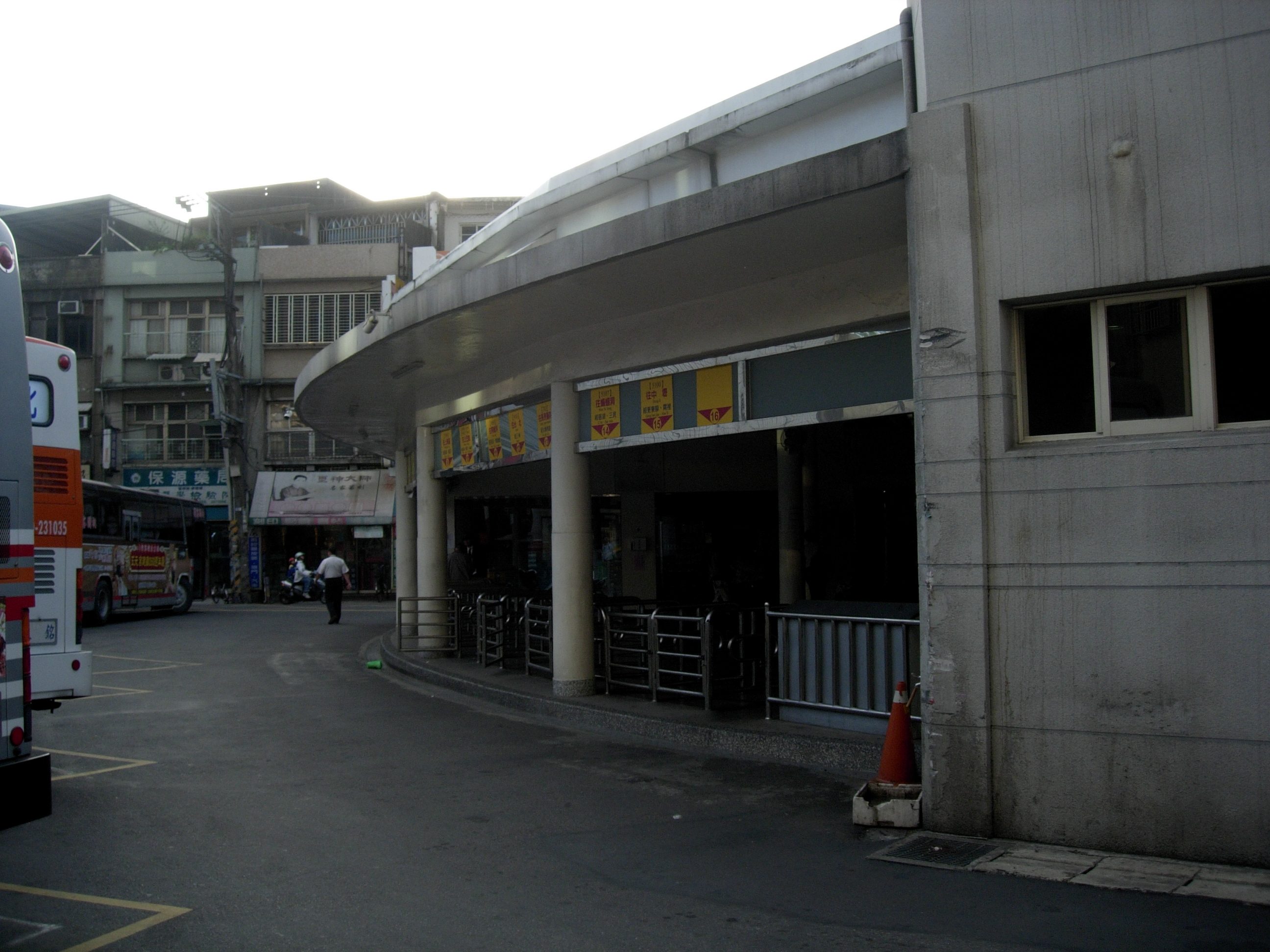 中文（台灣）: 桃園客運大溪站月台外觀